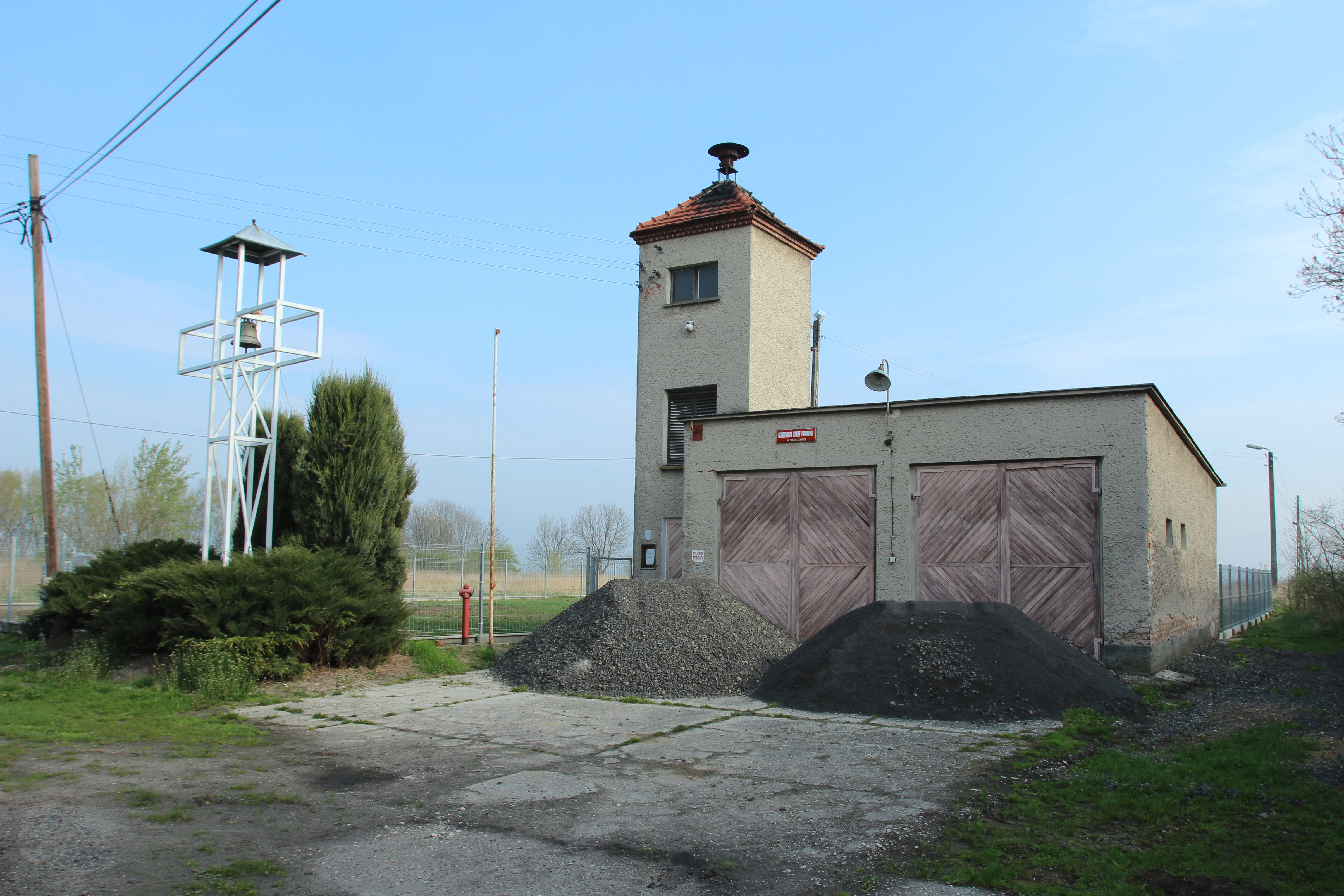 Stara Jamka – wieś w Polsce położona w województwie opolskim, w powiecie nyskim, w gminie Korfantów.